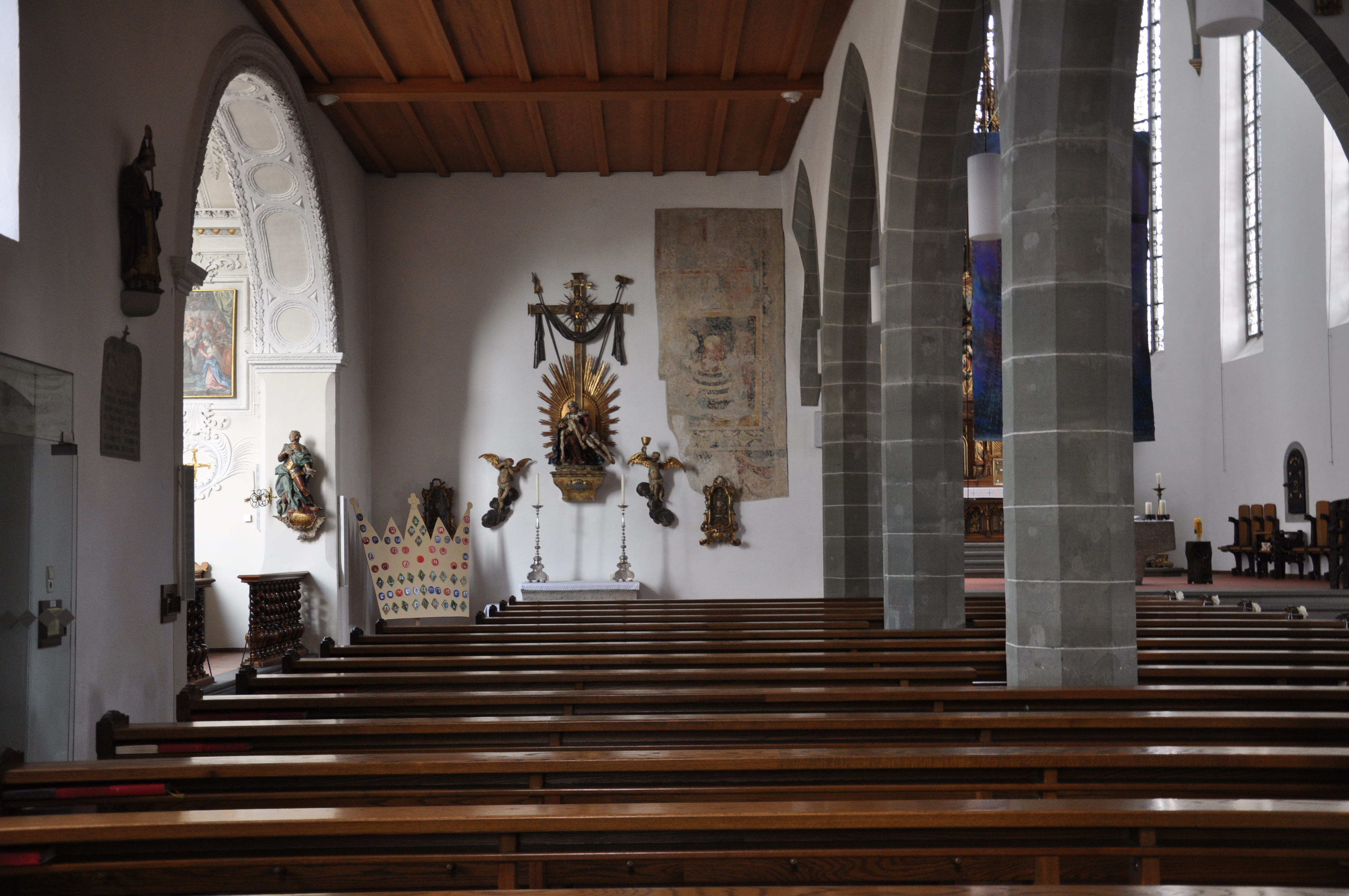 Kath. Pfarrkirche St. Nikolaus, Markdorf; Linkes Seitenschiff